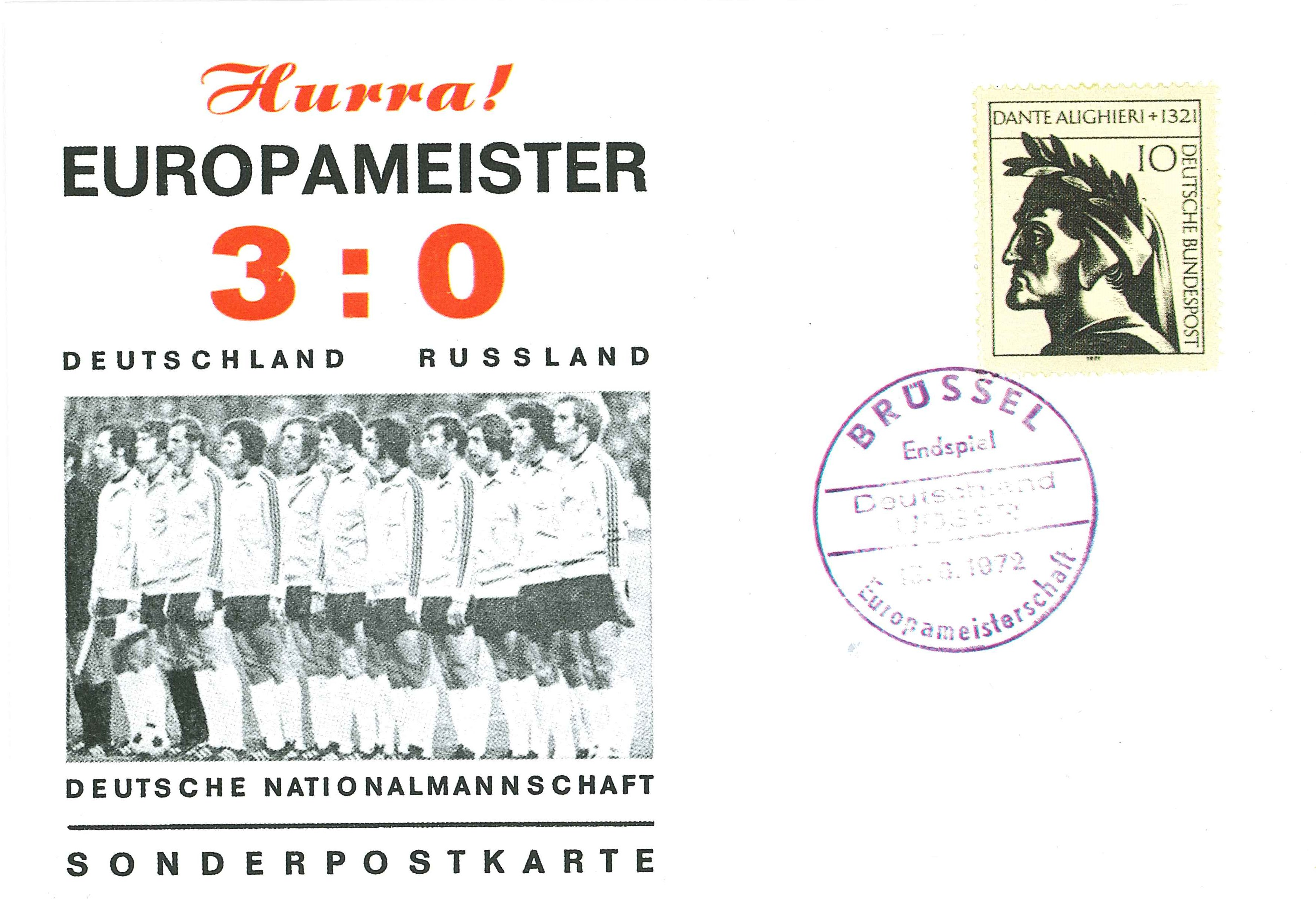 Sonderpostkarte EURO 1972 Endspiel